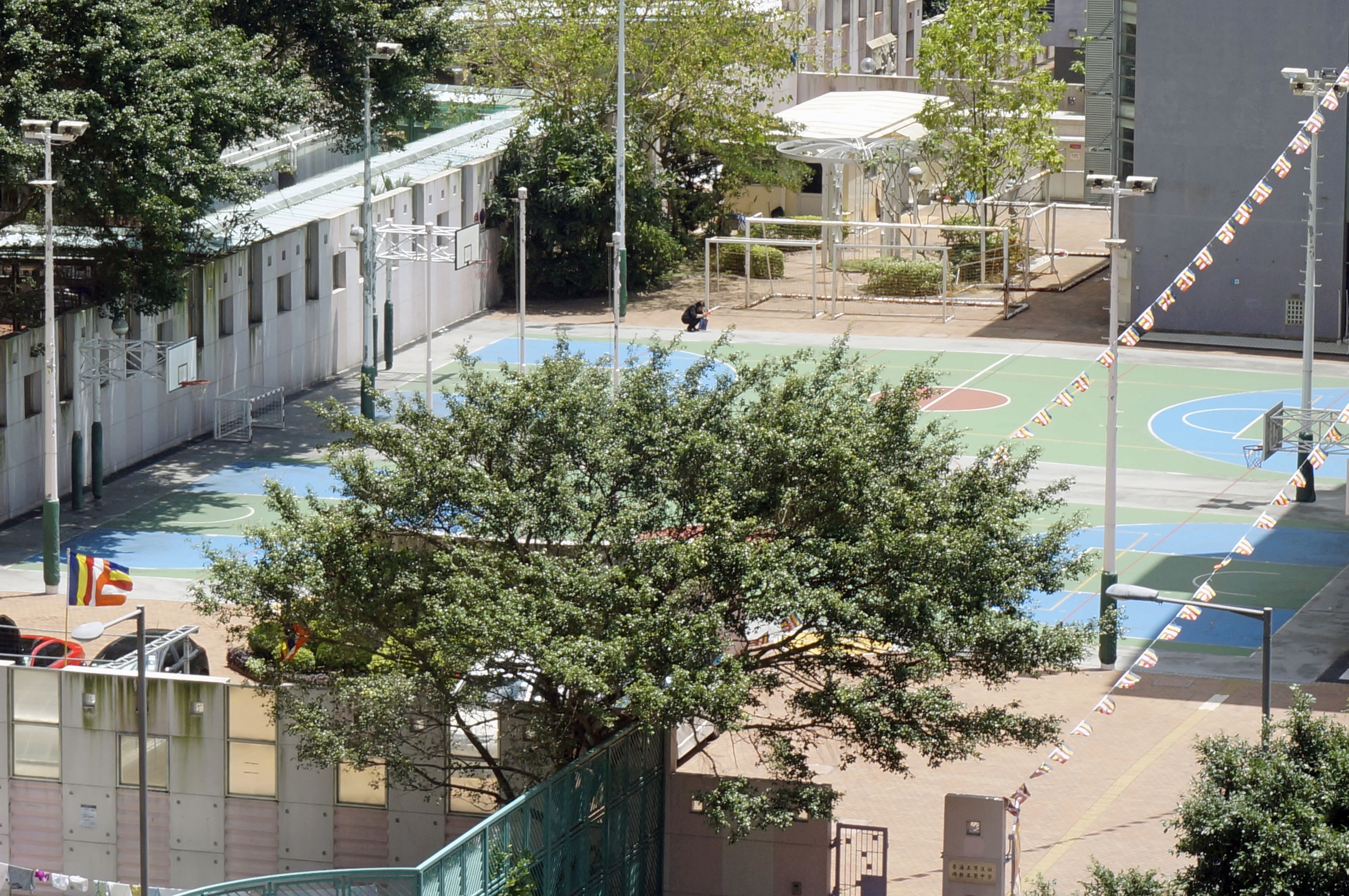 香海正覺蓮社佛教正覺中學調景嶺校舍球場